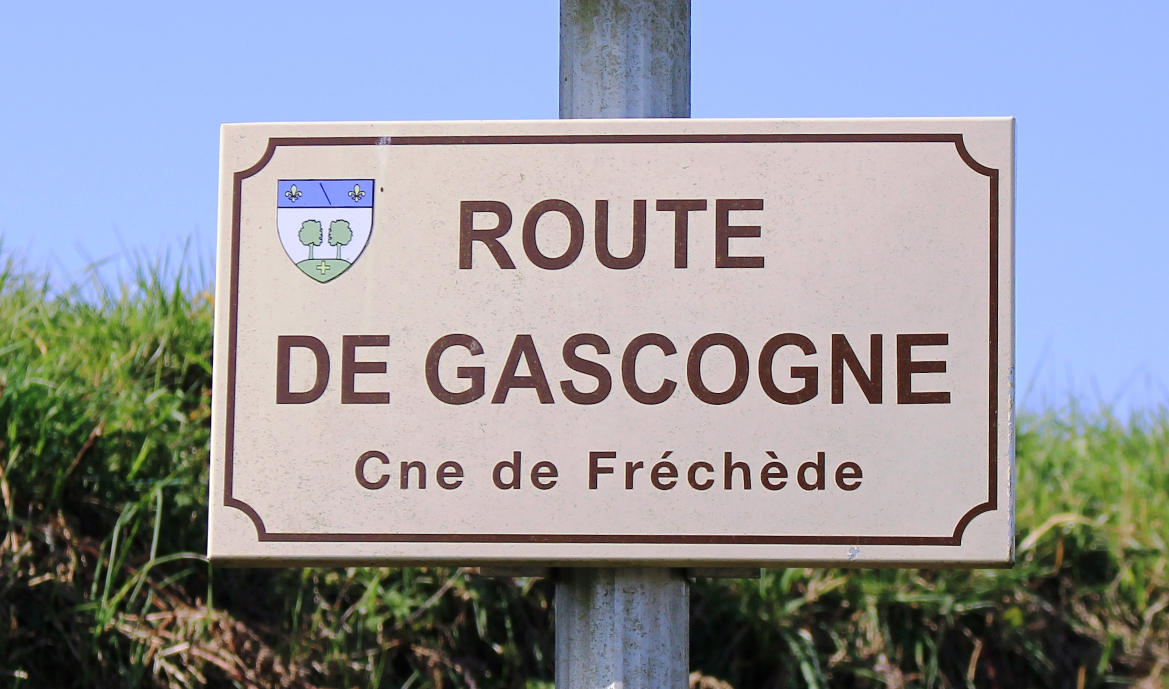 Rue du village de Fréchède (Hautes-Pyrénées)